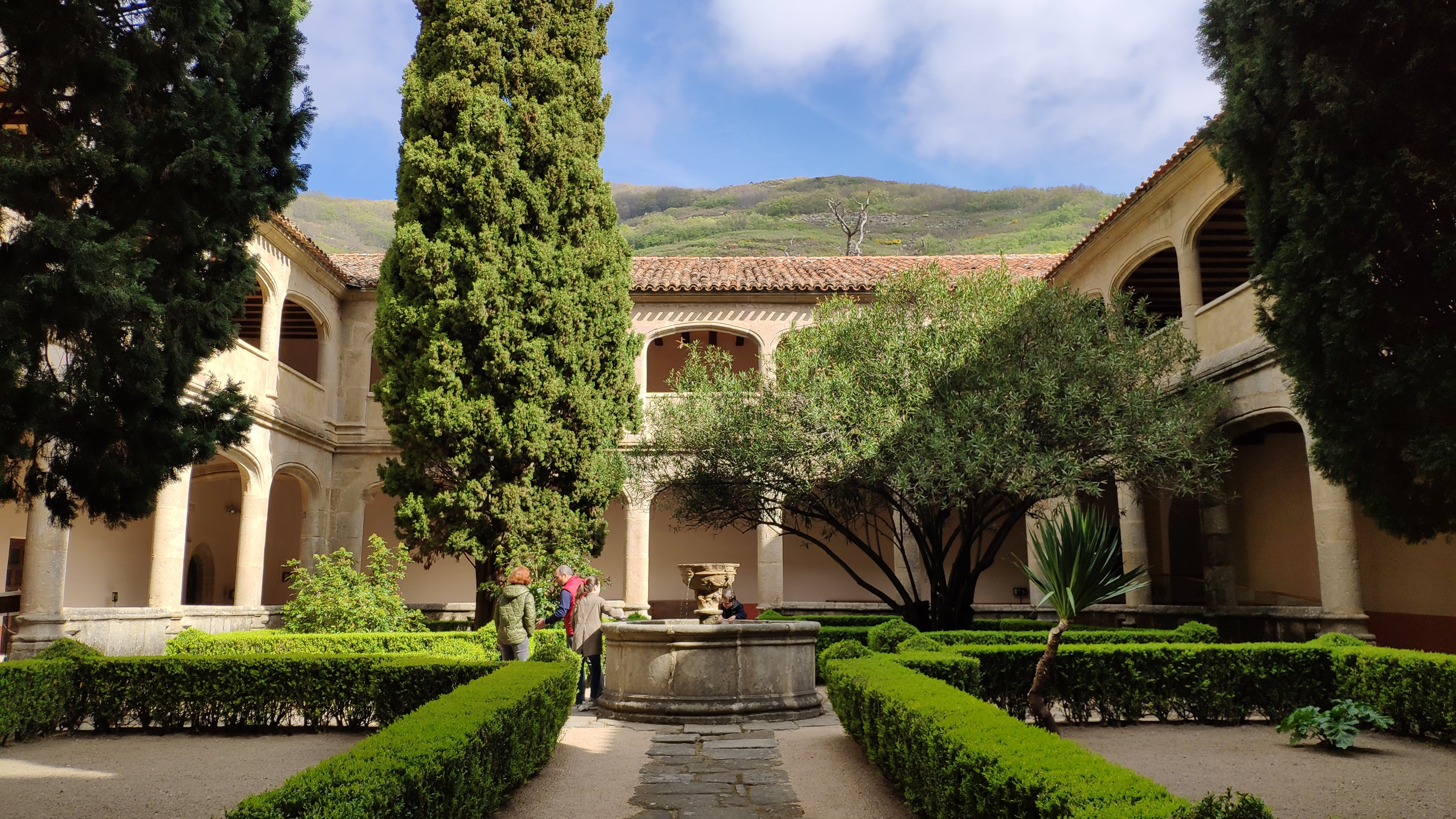 Claustro gótico del monasterio de Yuste, Cáceres